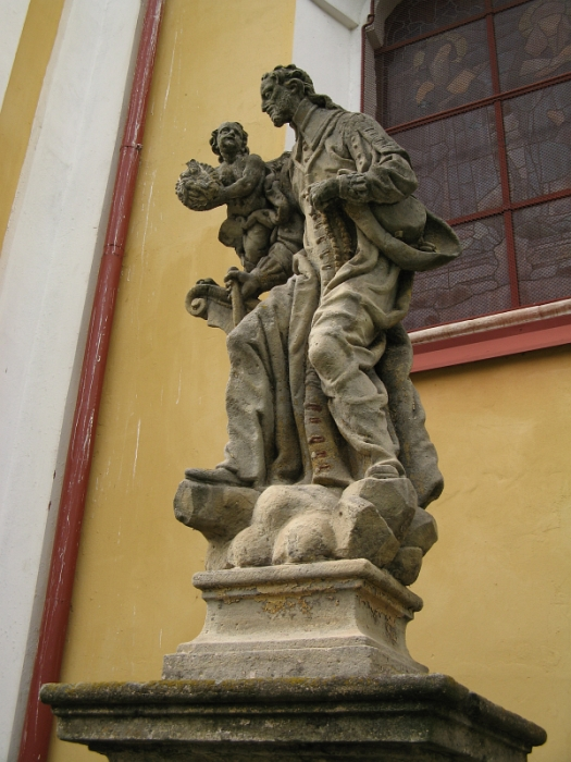 Socha svatého Jana Nepomuckého s palladiem, severně od křižovatky na Horní Jelení, Ostřetín.